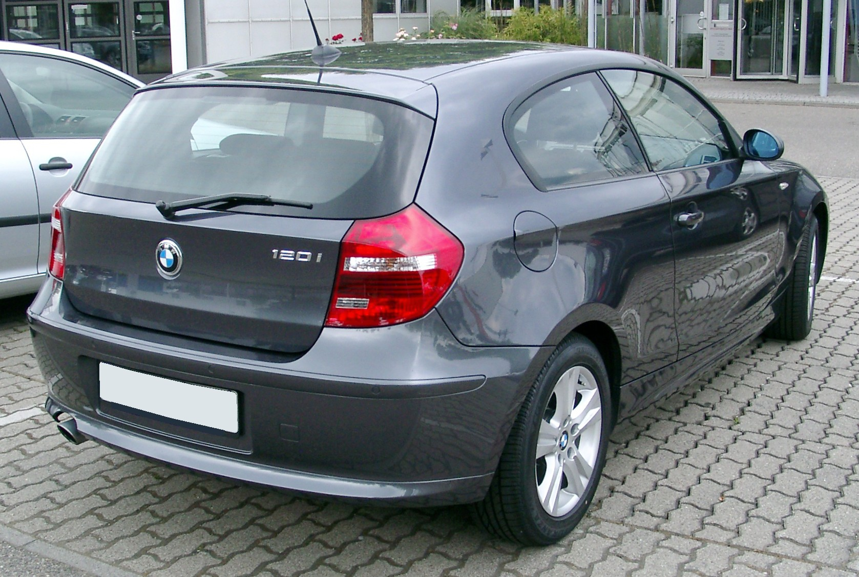 BMW 1er